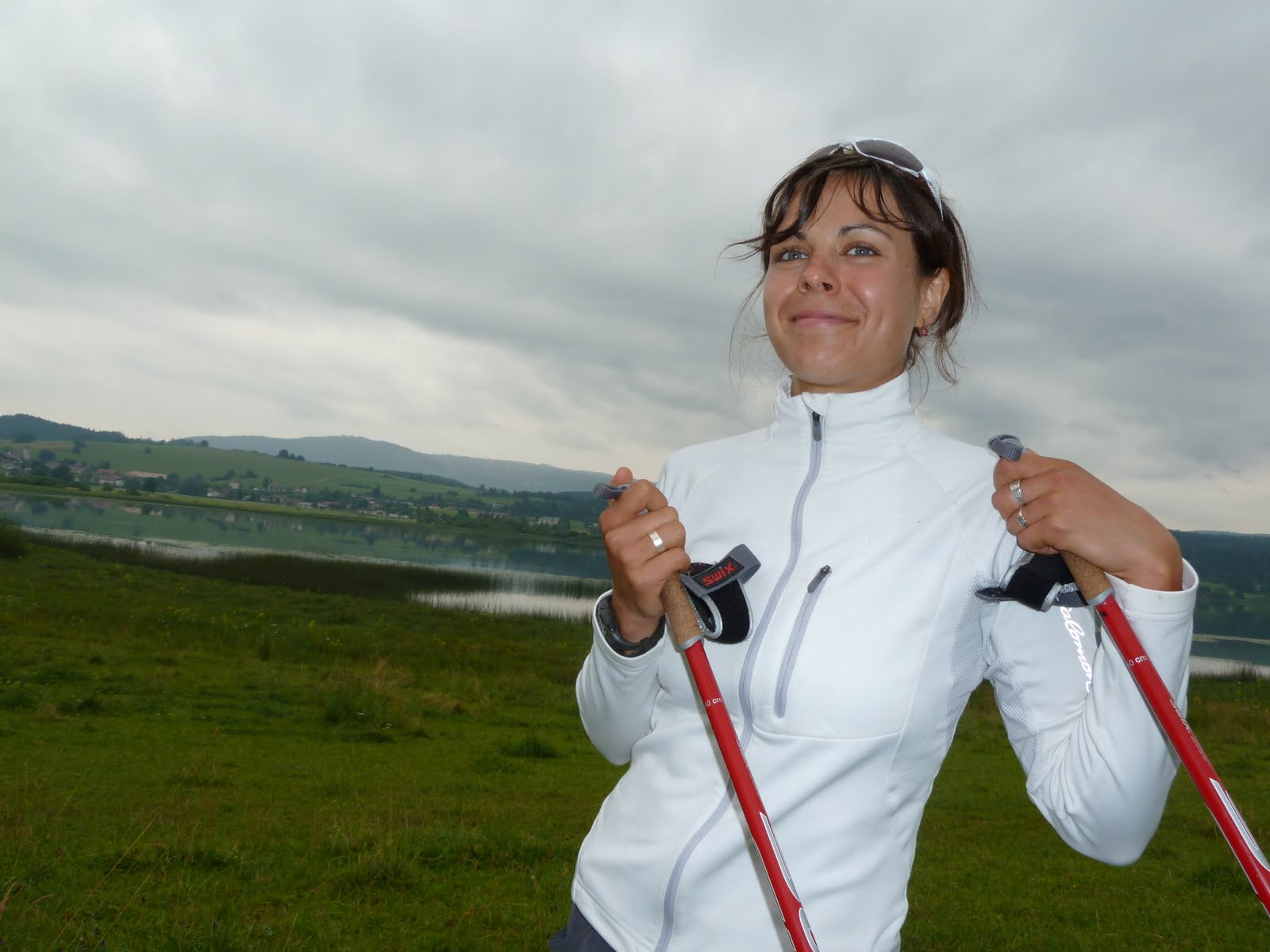 La fondeuse Pontissalien à l'entraînement sur la route de Remoray (Doubs).